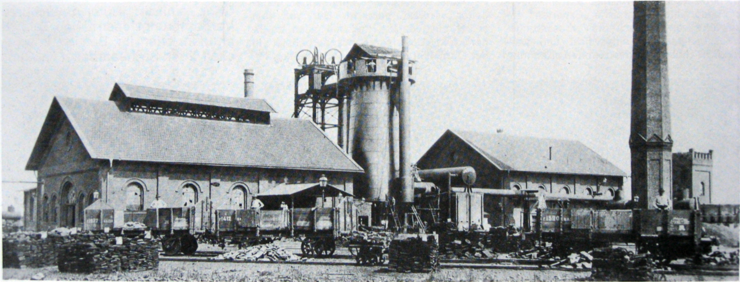 Dillinger Hütte wird 1869 nach 100-jähriger Pause wieder ein Hochofen angeblasen